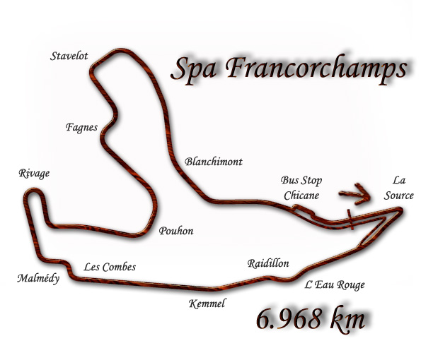 Belgian Grand Prix Formula 1 /1996-2001/ Autor: Jiří Žemlička